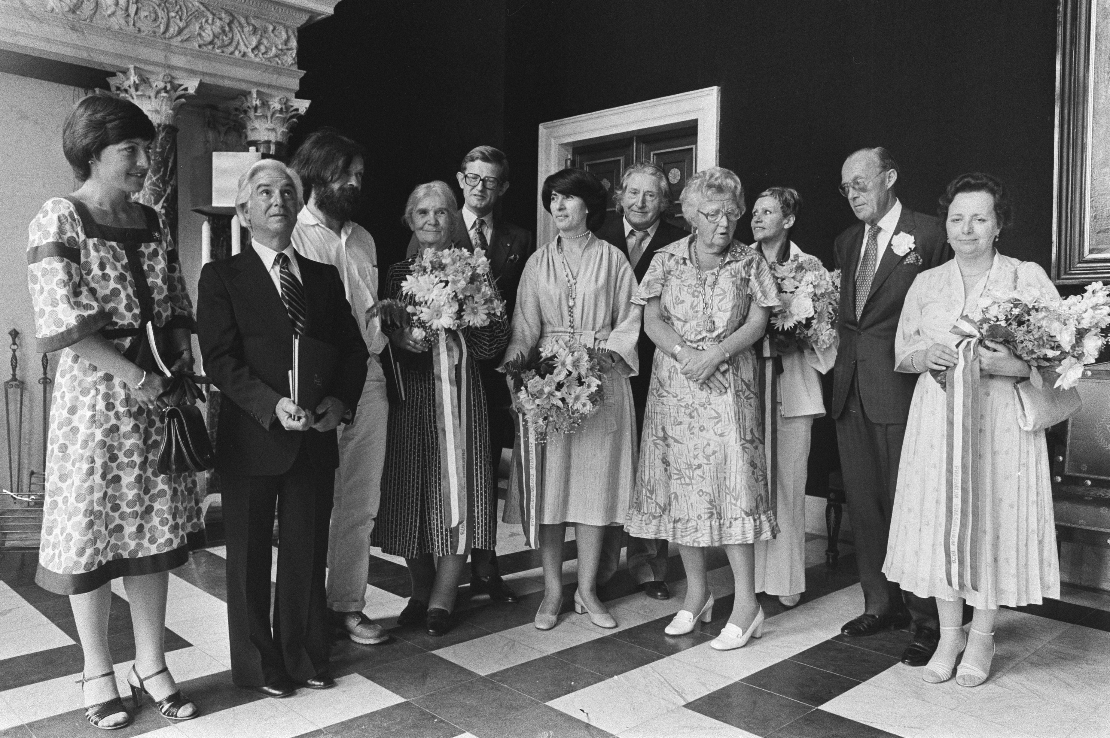 Erasmus Prijs 1978: La Marionettistica Fratelli Napoli, Italiaans poppentheater;Ţăndărică, Roemeens poppentheater, op dat moment onder leiding van Margareta Niculescu;Yves Joly, Frans poppenspeler; Bread and Puppet Theater, Amerikaans poppentheater van Peter Schumann. Op de foto v.l.n.r.: prinses Margriet, Napoli, Peter en Margarata Schumann , Pieter van Vollenhoven etc. 3 juni 1978